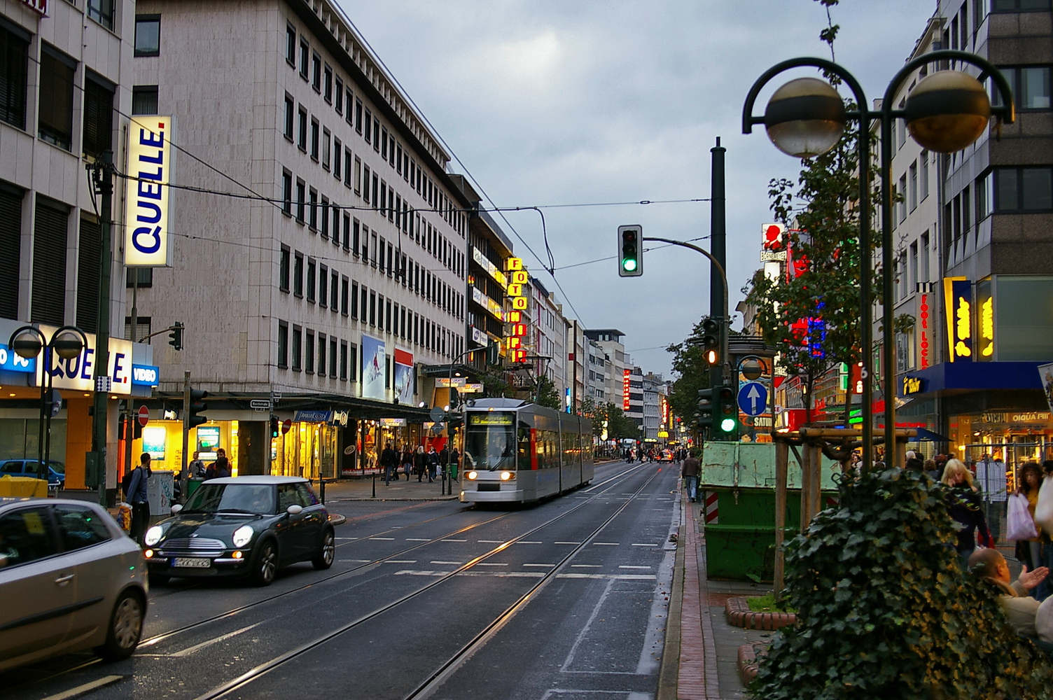 Schwadowstraße in Düsseldorf, Blickrichtung Osten, abendlich